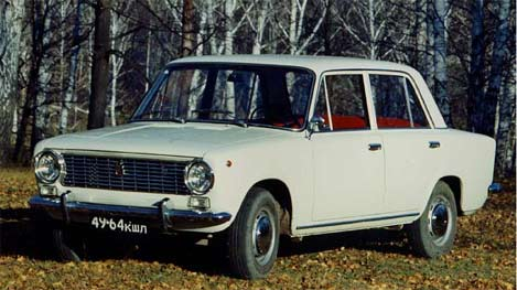 Съветски лек автомобил ВАЗ-2101.